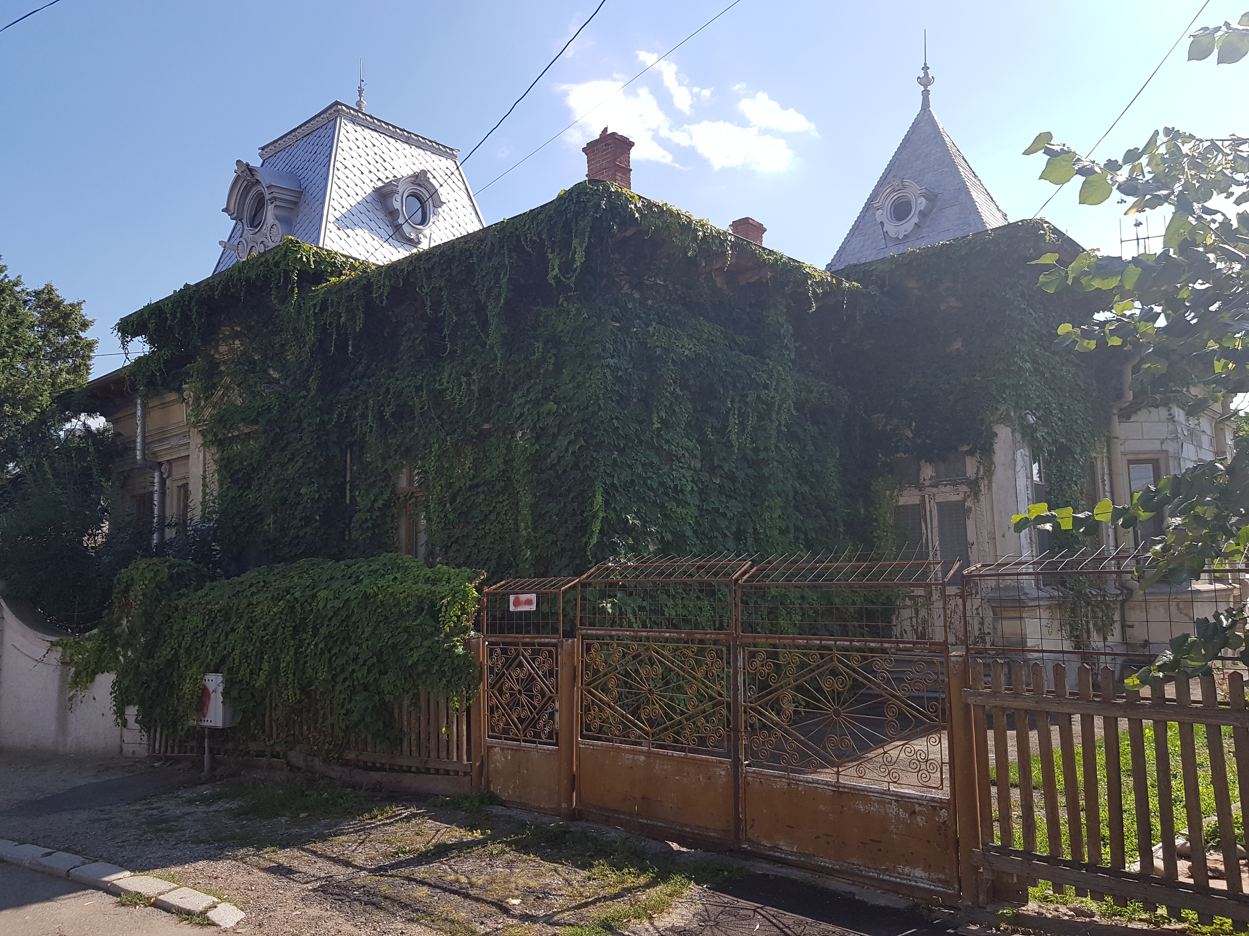 Monument istoric